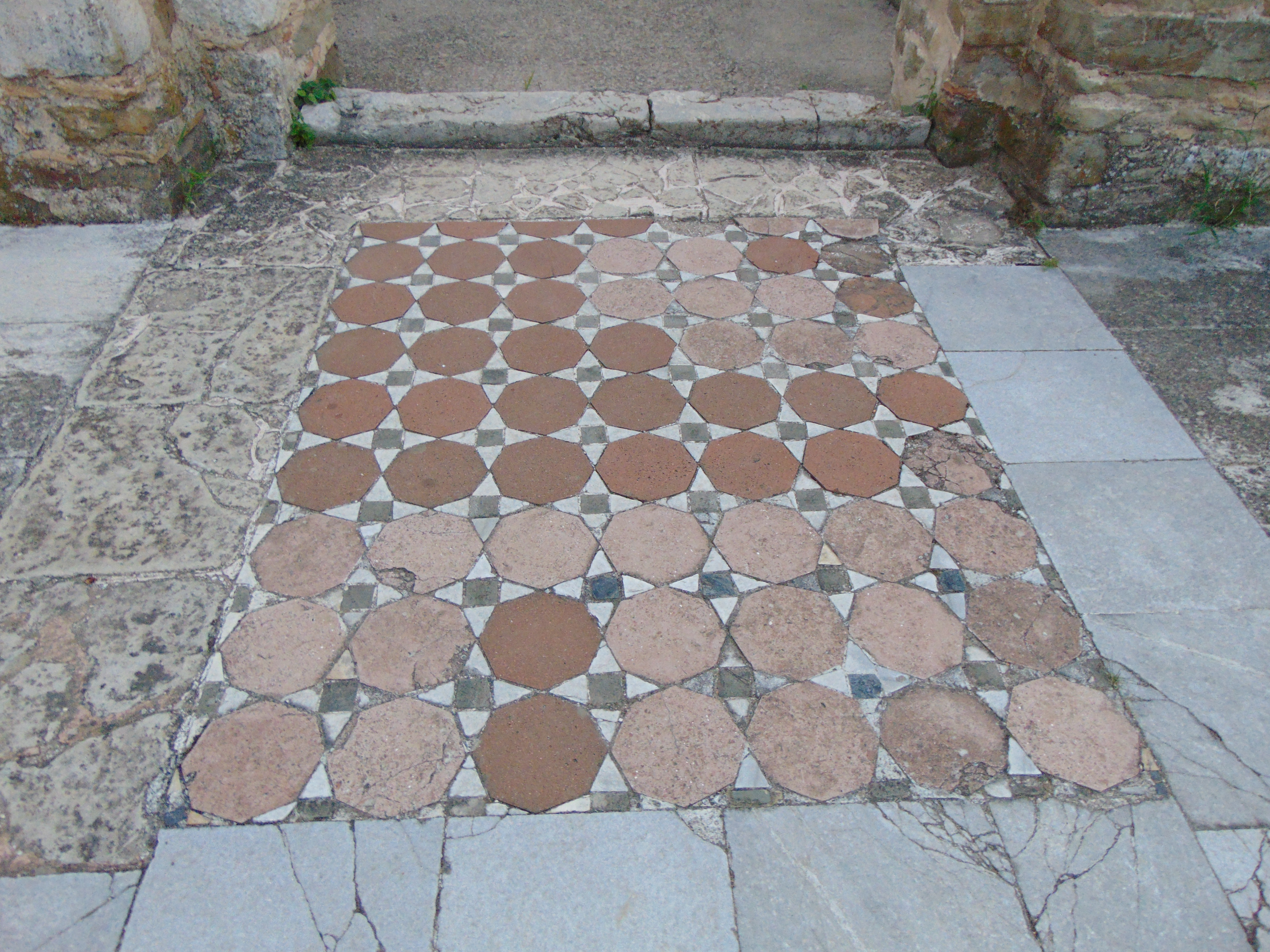 Кръглата църква Преслав